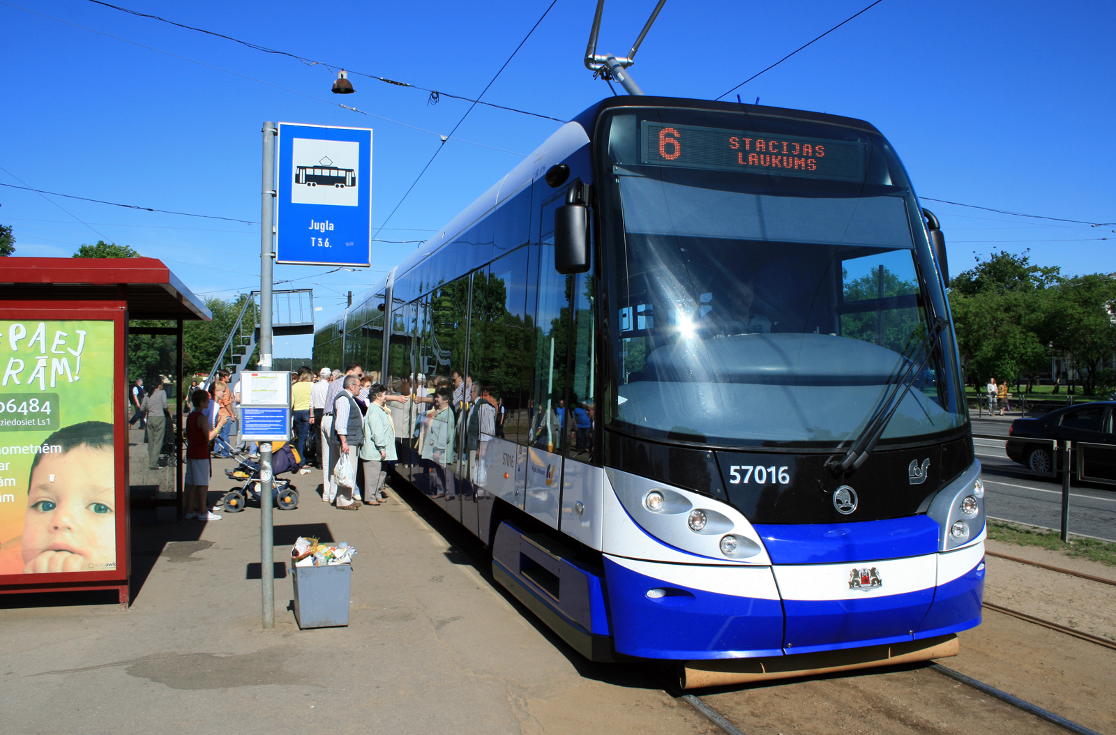 Zemās grīdas tramvajs Škoda 15T atrodas Juglas galapunktā.